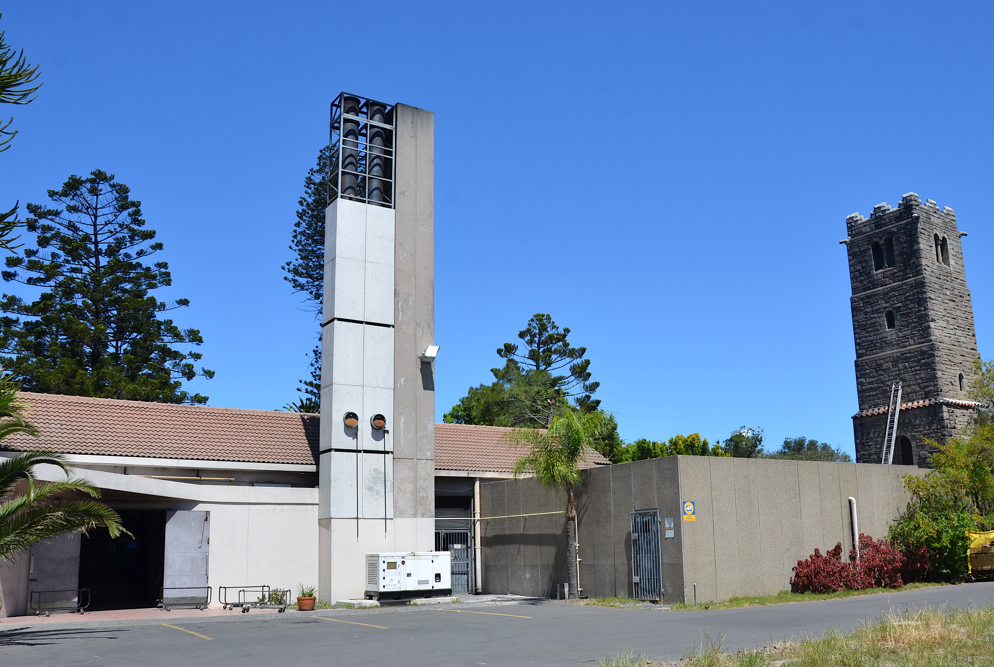 Maitland Krematorium, Kapstadt (Südafrika)